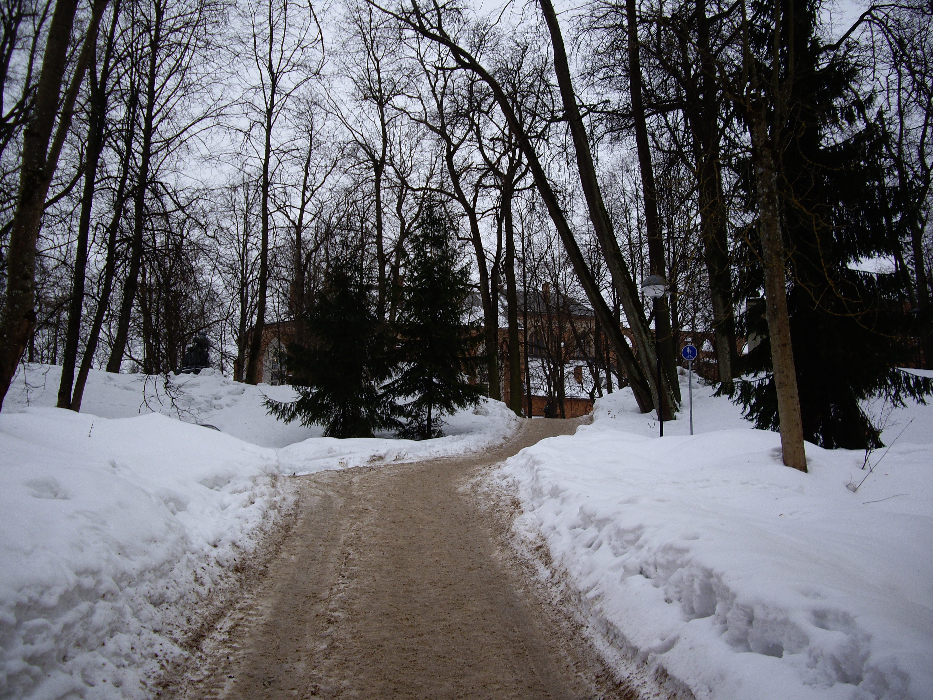 Eemalt paistab Toomkiriku põhjakülg.